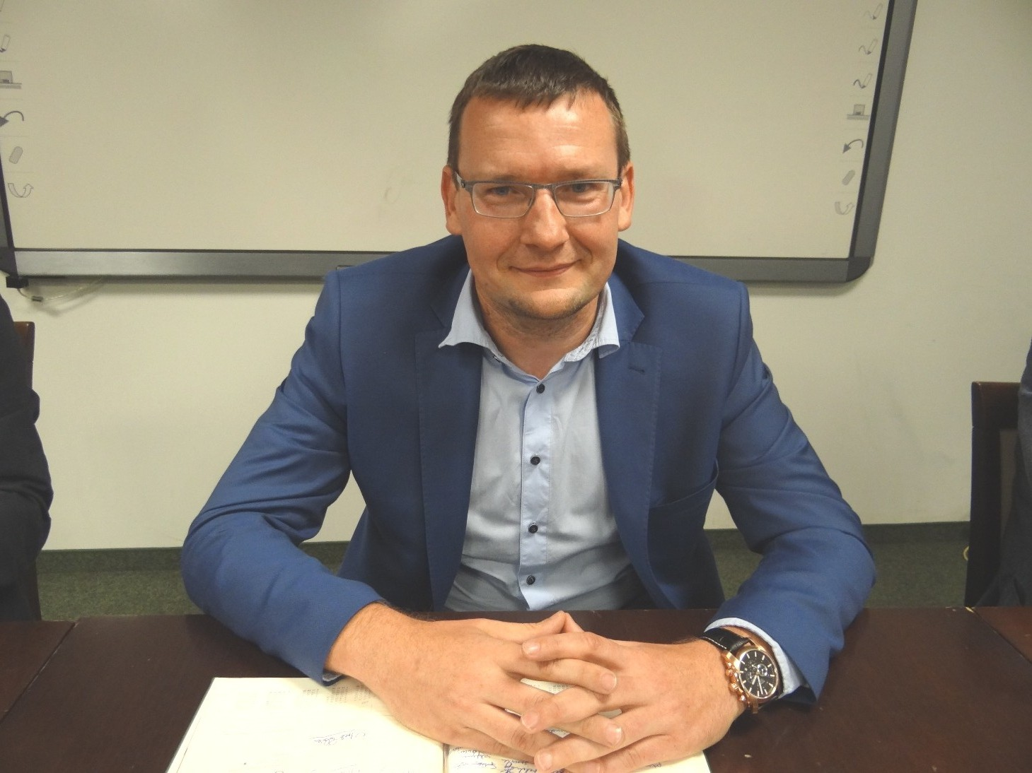 Prezes Paweł Ksiądz